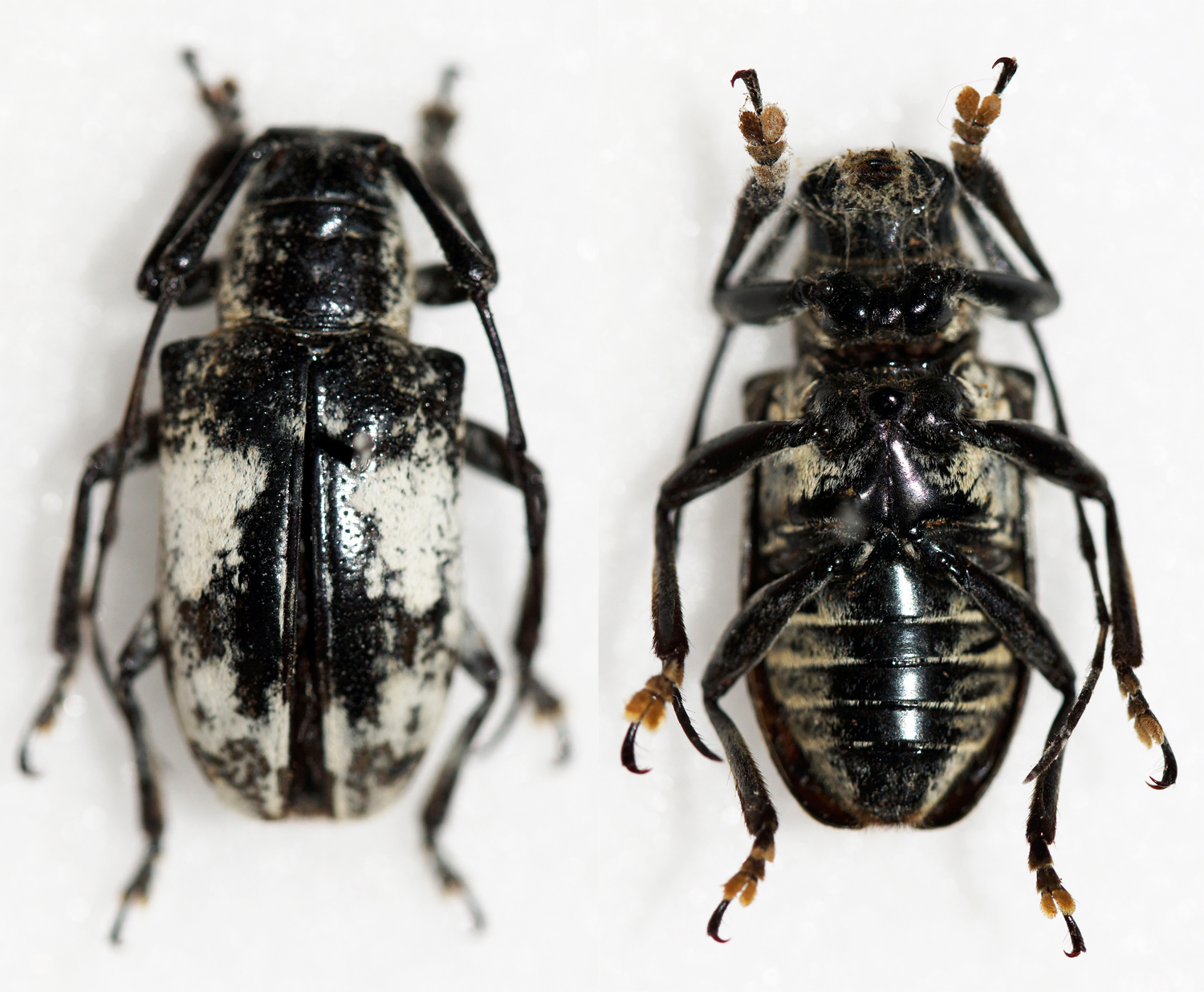 Breuning,1947 Sex: Female Data: 02-2014 - Mt Apo - Mindanao - Philippines Size: 18mm